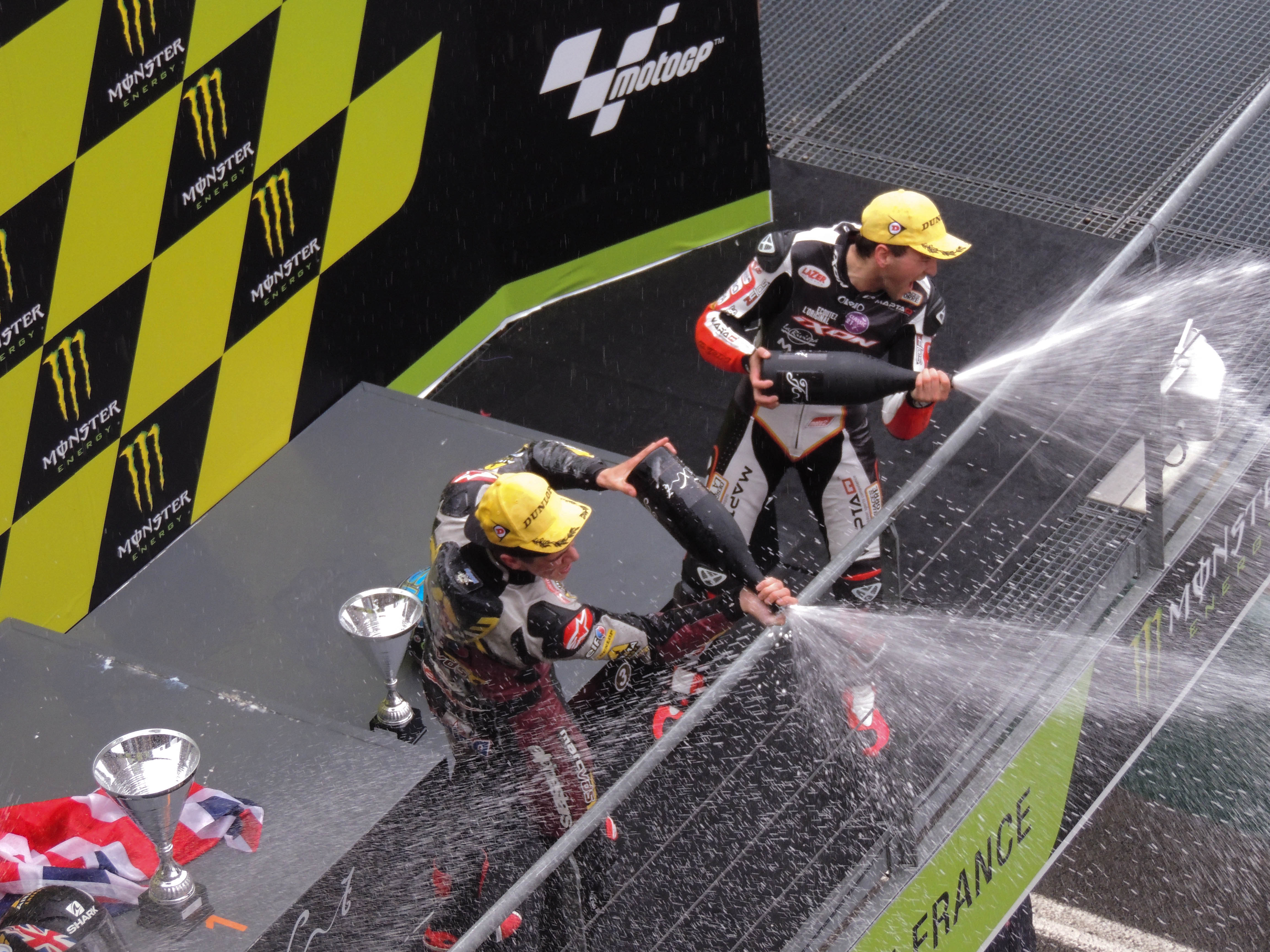 Scott Redding et Xavier Simeon fêtent leur résultat sur le podium après la course.